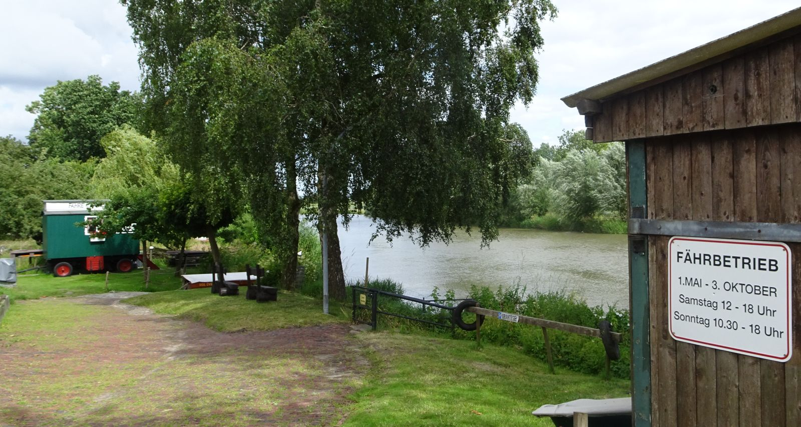 Fährzeiten Kronsnest